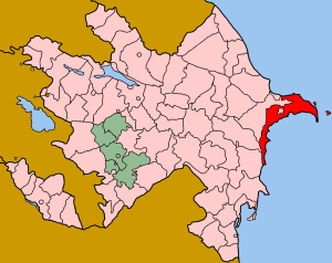 Map of Azerbaijan showing Baku (Bakı) sahar.